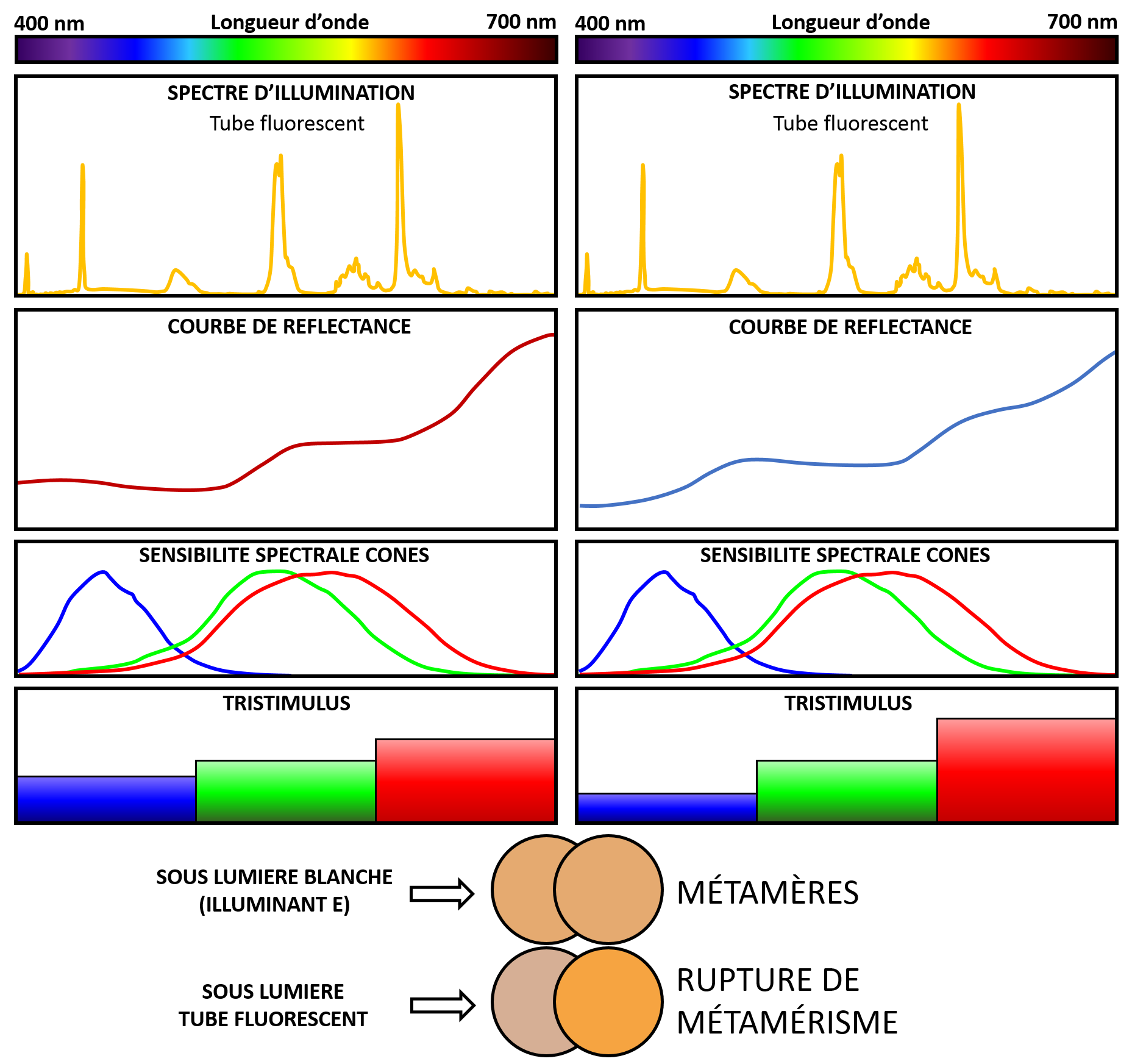 Rupture du métamérisme de deux couleurs de surface (pigment faon, K. M. Lam, 1985) sous éclairage par tube fluorescent.